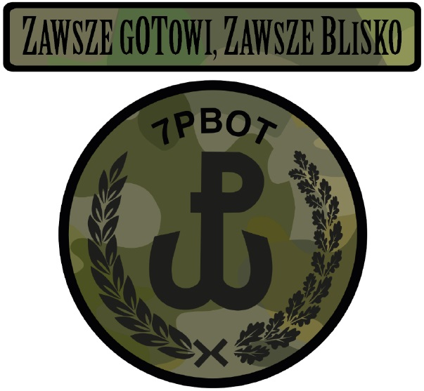 7 Pomorska Brygada Obrony Terytorialnej – oznaka rozpoznawcza na mundur polowy – 2019, Polska.